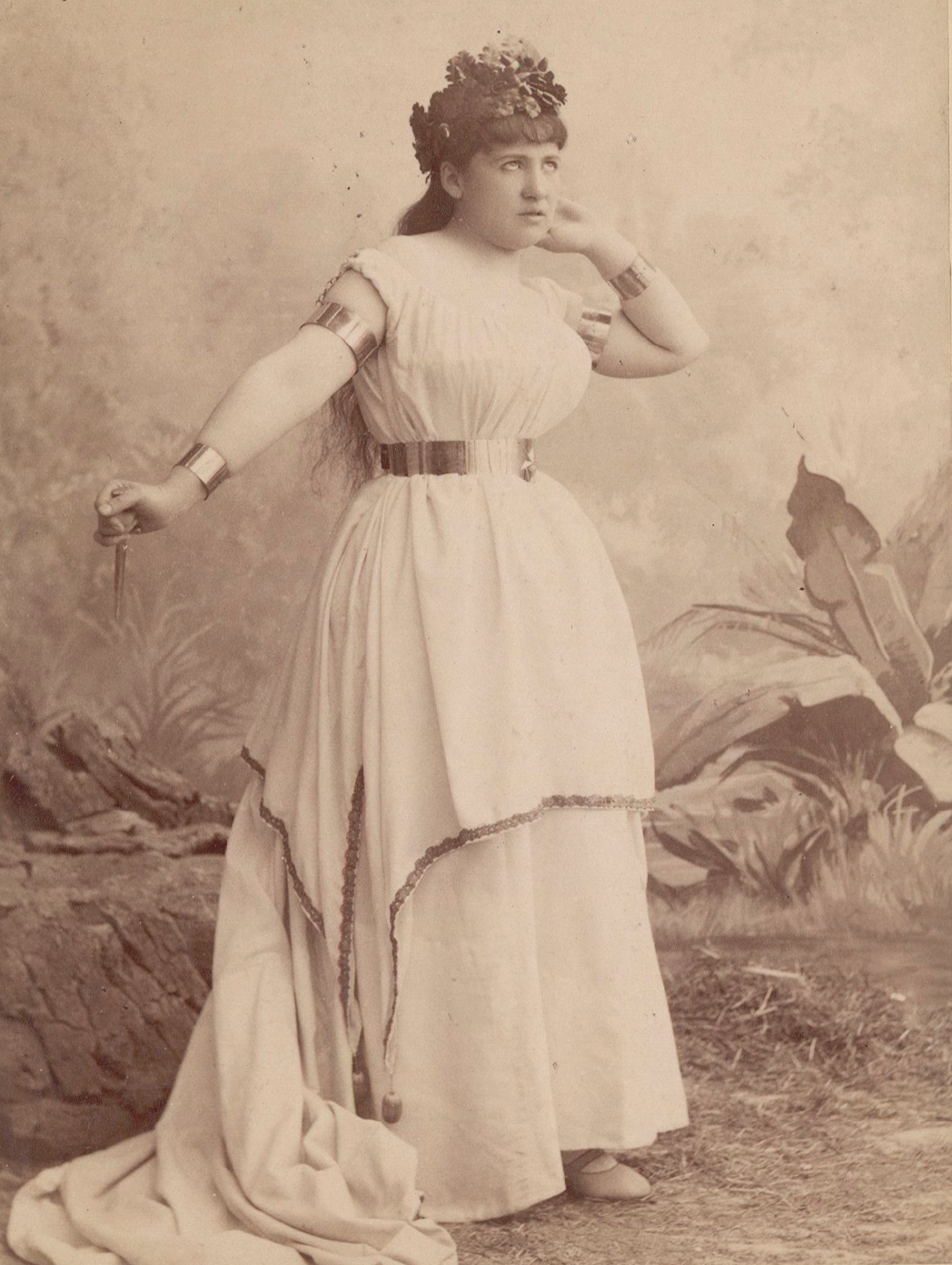 Portrait d'Alphonsine (pseudonyme de Jeanne Benoit).